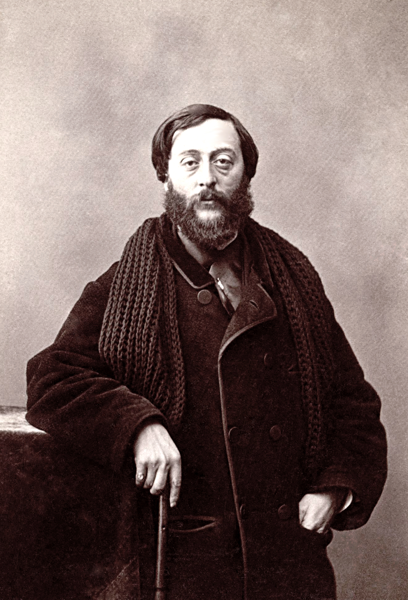 Louis Ratisbonne (1827 - 1900), écrivain français